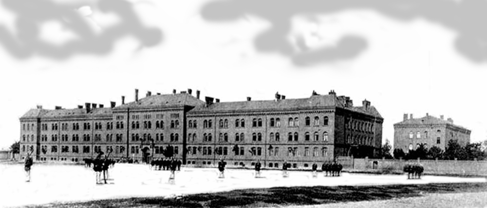 Infanteriekaserne in Danzig-Neufahrwasser